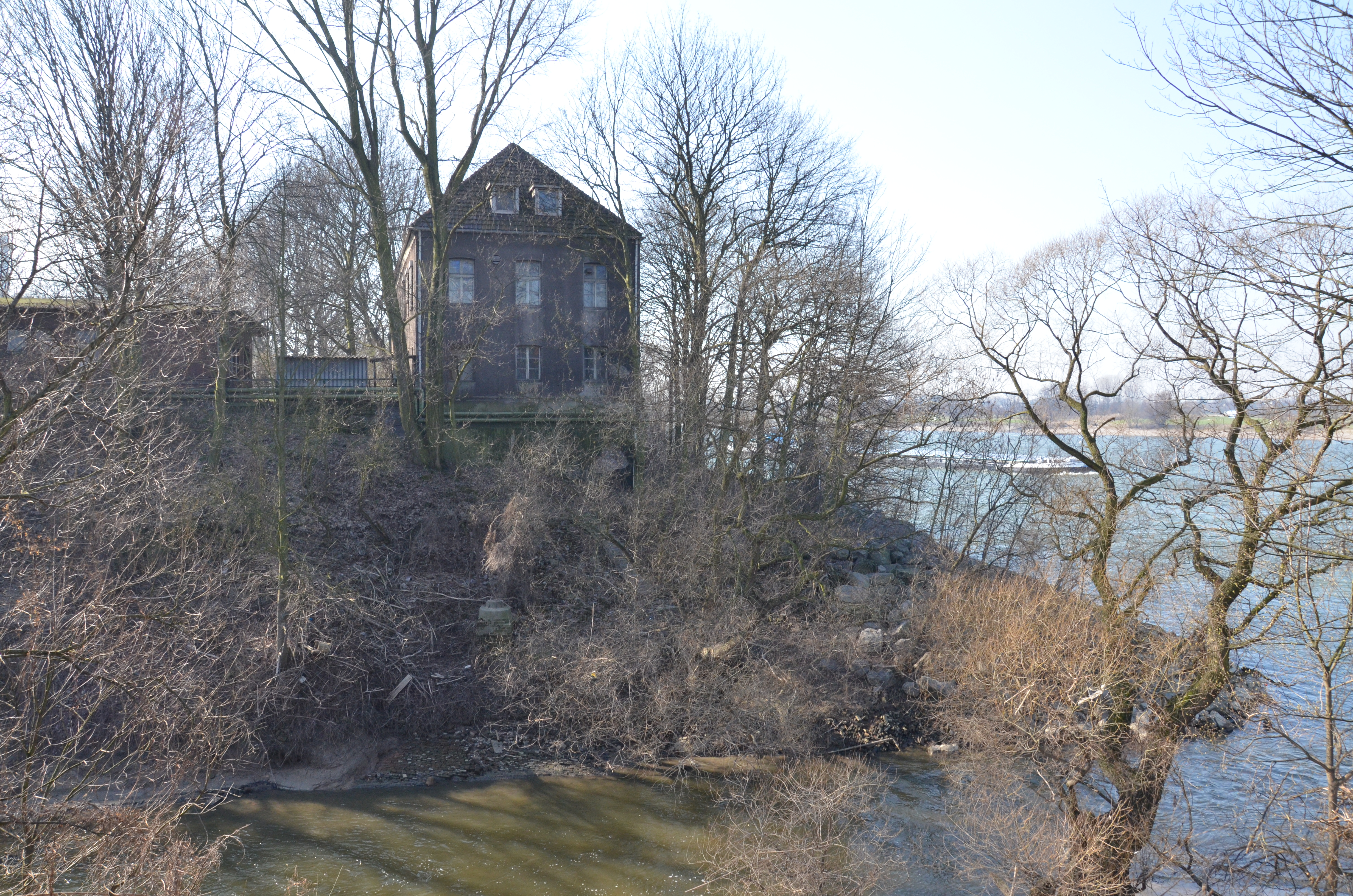 Angerort in Duisburg Angerhausen am Rhein